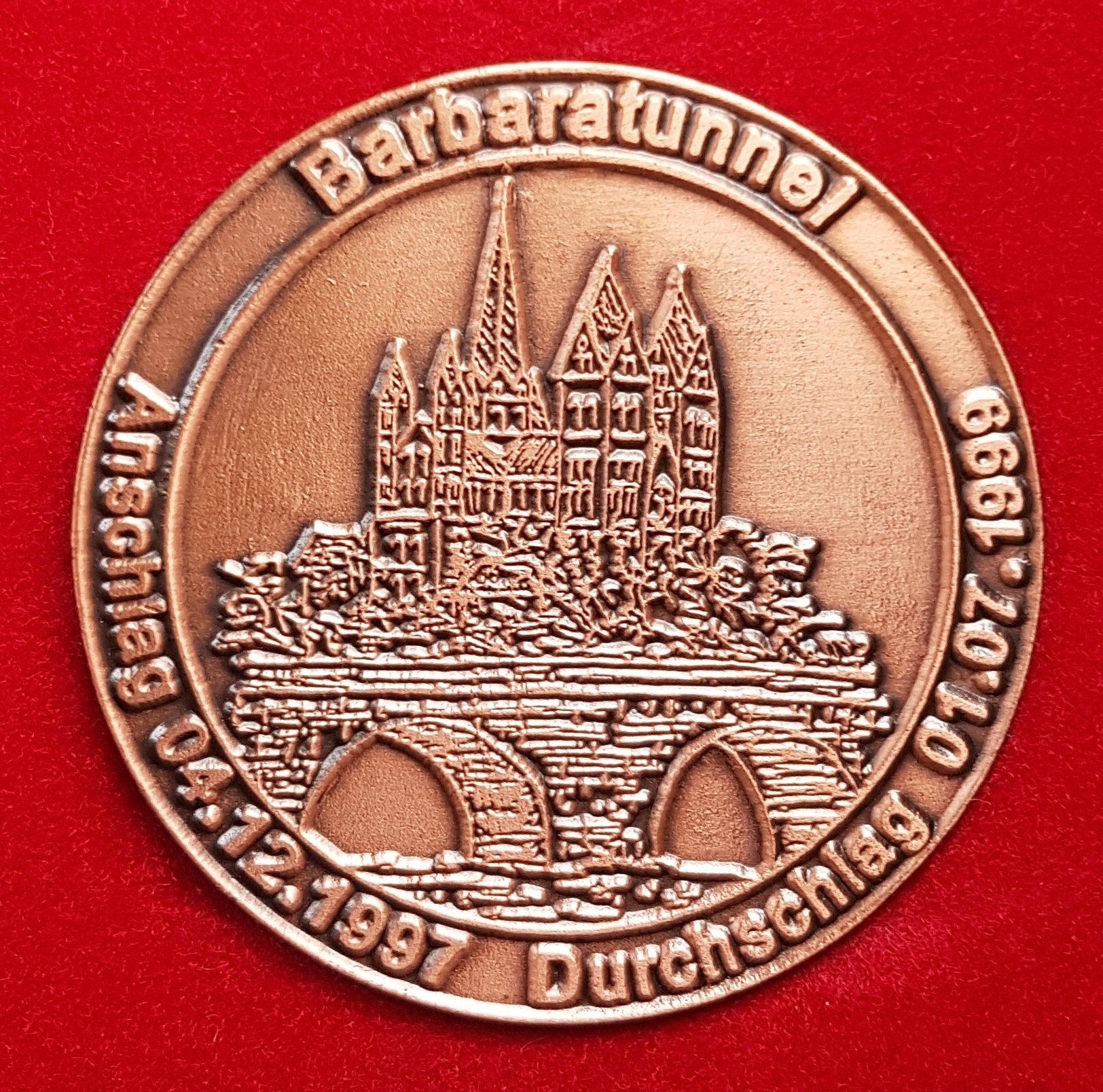 Gedenkmedaille herausgegeben zum Durchschlag des Limburger Barbaratunnels der Schnellfahrstrecke Köln–Rhein/Main am 1. Juli 1999